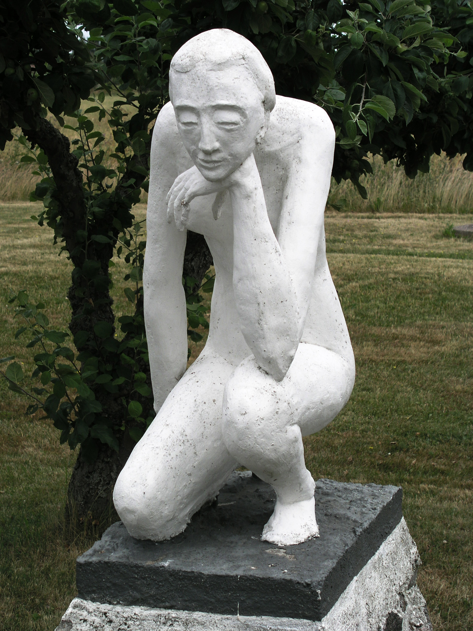 Tempelgården, Visingsö, Jönköpings län, Sverige.